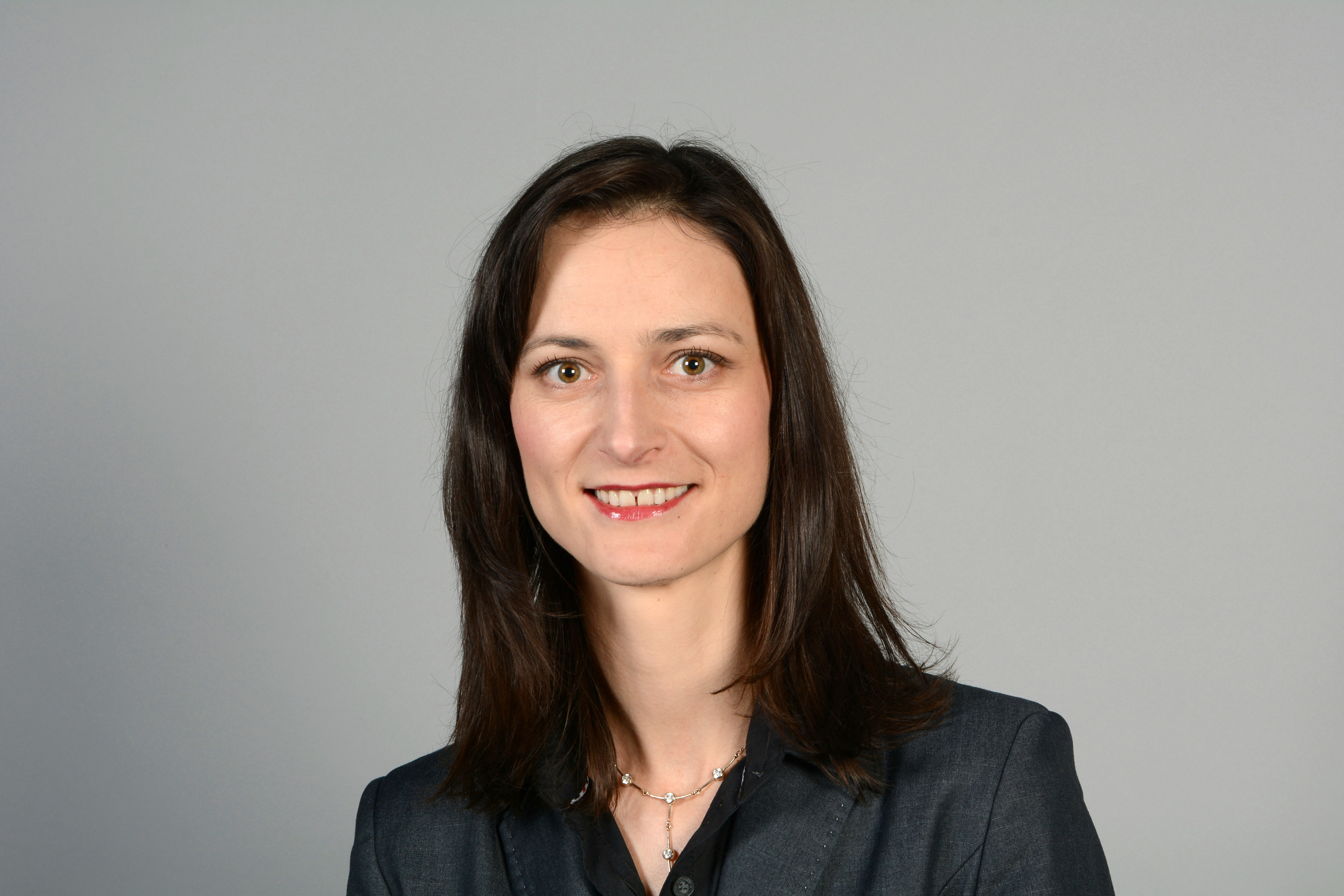 Mariya Gabriel, Bulgarien, 2014 Mitglied des Europäischen Parlaments (MEP)